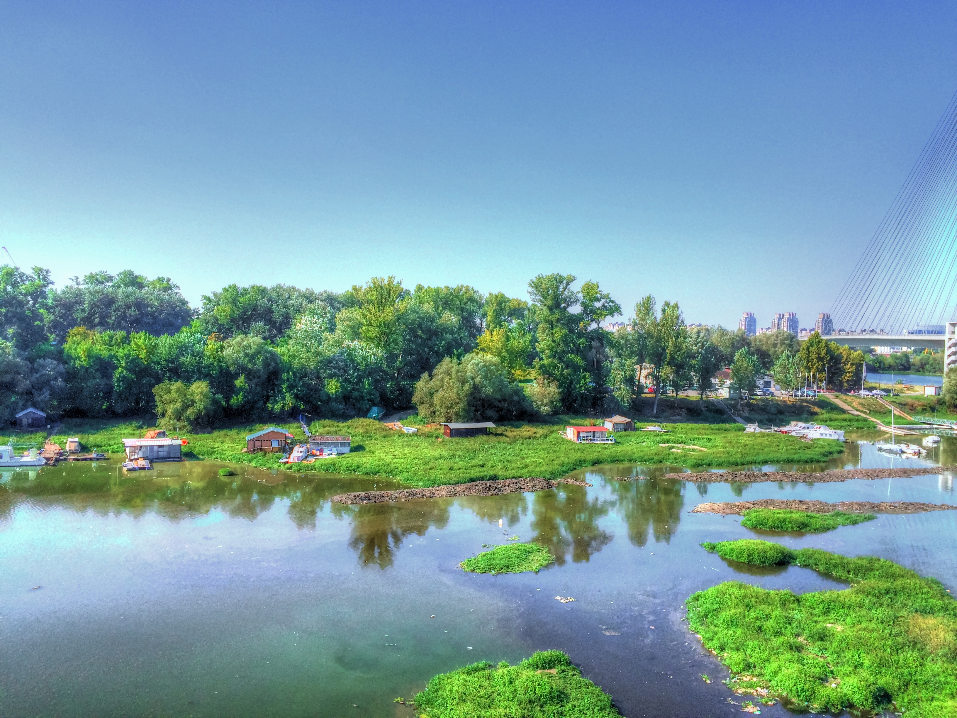 Ada Ciganlija